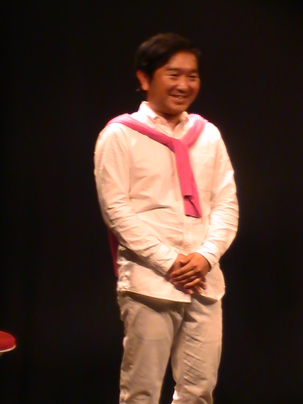 小石田純一 (2017年7月1日)